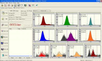 спектр волнодисперсионного спектрометра